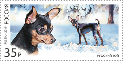 Почтовая марка России, выпущенная 28 февраля 2019 года, из серии «Декоративные породы собак». На марке изображён русский той. Дизайнер — О. Савина. Номер по каталогу — 2451.